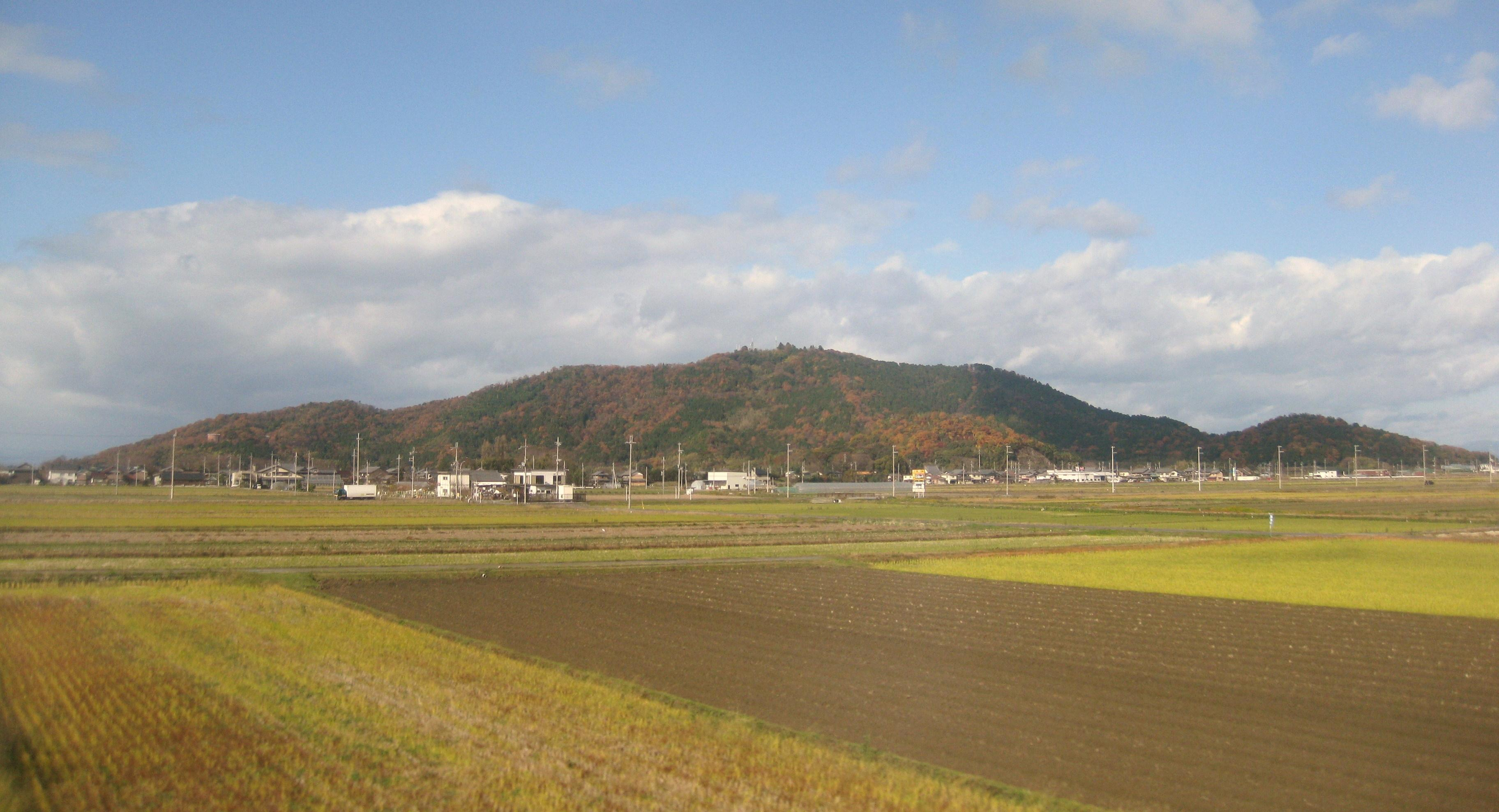 滋賀県彦根市の荒神山。東海道本線（琵琶湖線）の車窓より。